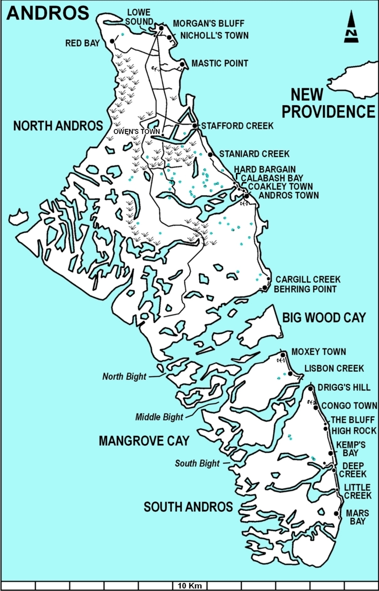 Karte von Andros